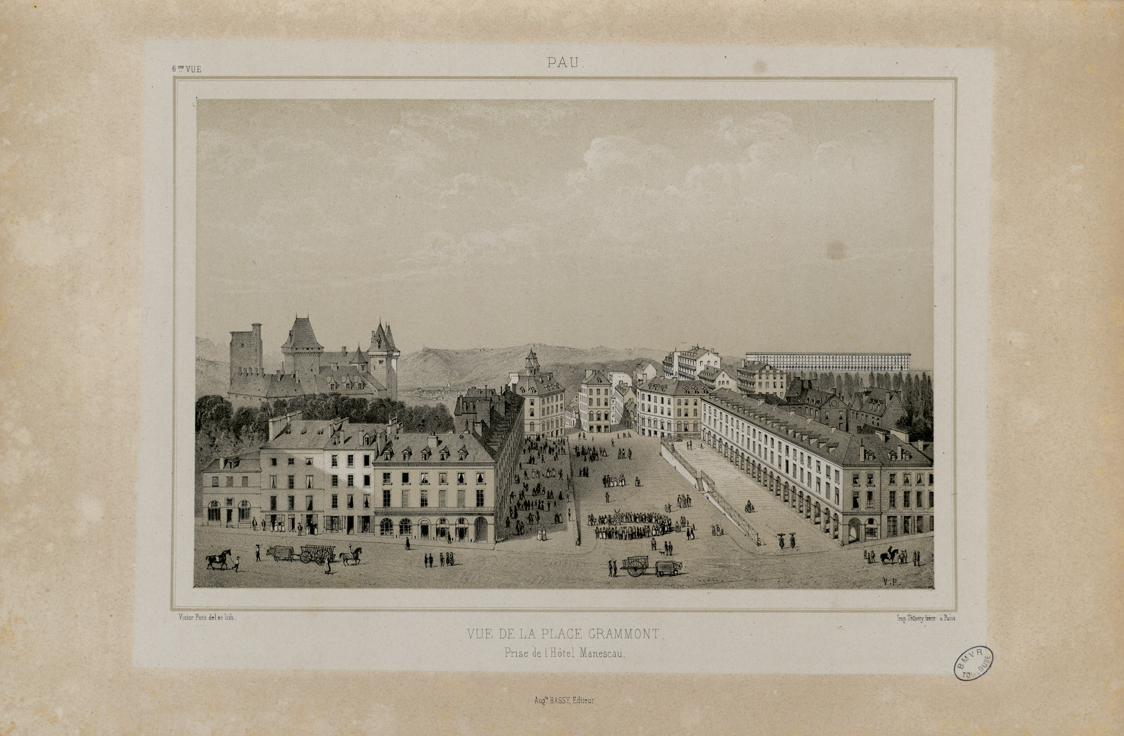 Imprimerie Lemercier à Paris et imprimerie Thierry frères à Paris Fait partie d'un recueil de 5 albums (Souvenirs de Pau; Souvenirs des Eaux-Bonnes; Souvenirs des Eaux-Chaudes; Souvenirs de Cauterets; Souvenirs des Hautes-Pyrénées) composés d'une page de titre lithographiée, d'une notice explicative et de plusieurs vues. Pièce jointe dans le 1er album : Panorama des Pyrénées - Côté du Pic du Midi de Pau - Panorama des Pyrénées. Côté du Pic du Midi de Bigorre - Vue prise de la Place Royale à Pau (2 feuilles assemblées). Ancely, René (1876 - 1966). Possesseur